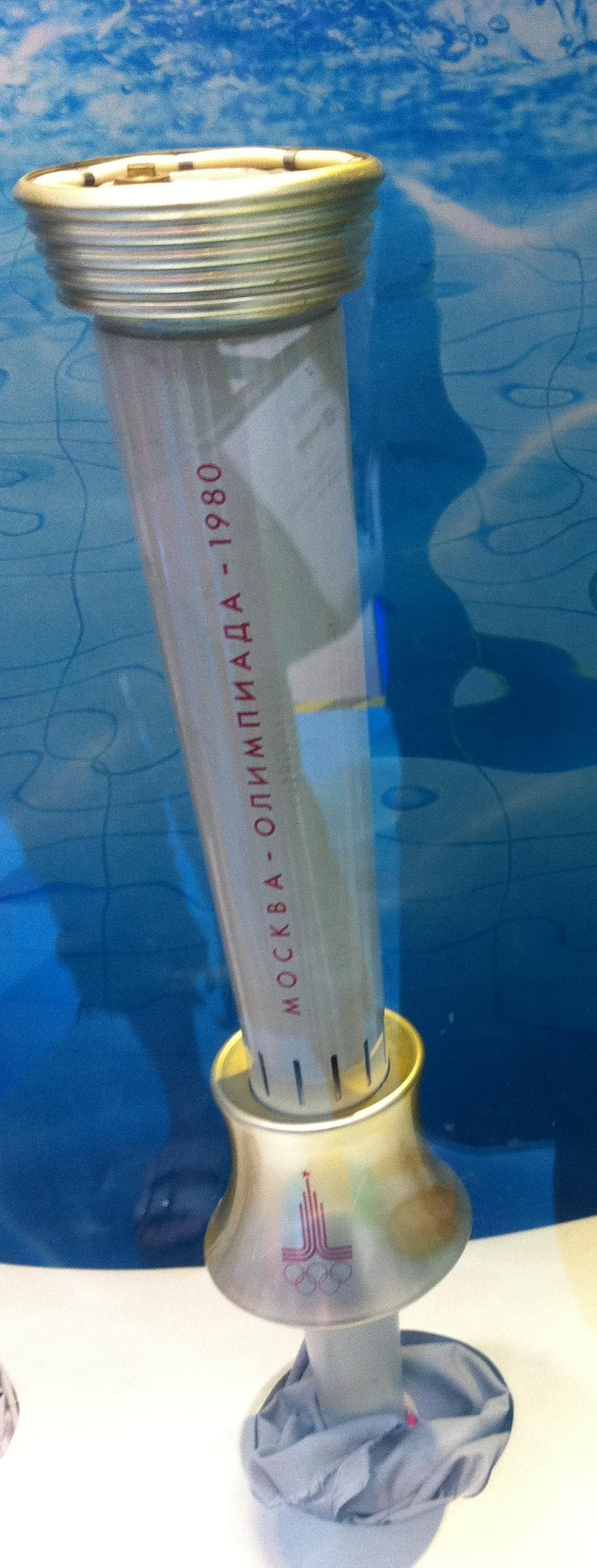 1980年夏季奧運火炬